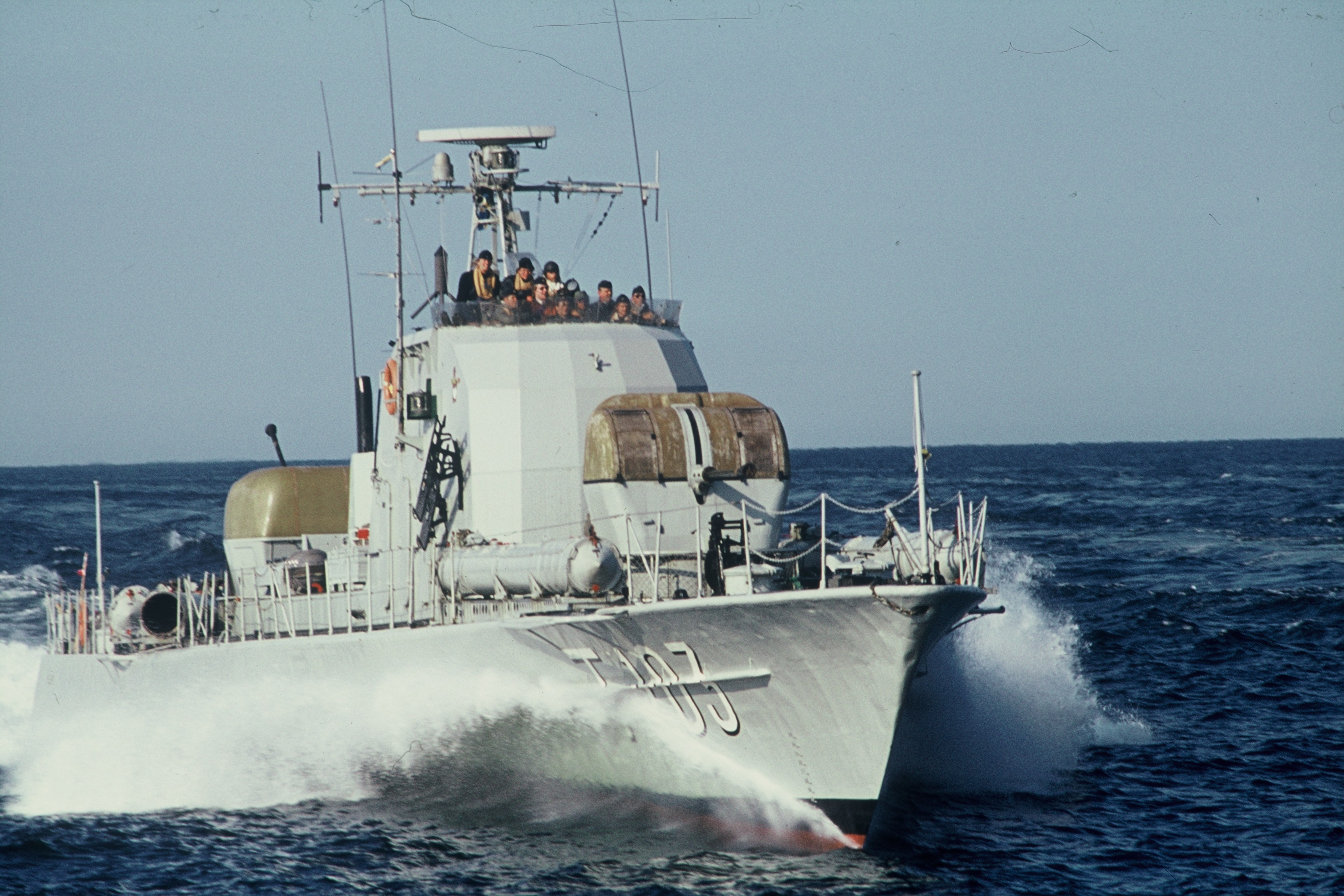 Torpedbåten T103 Polaris av Plejadklass